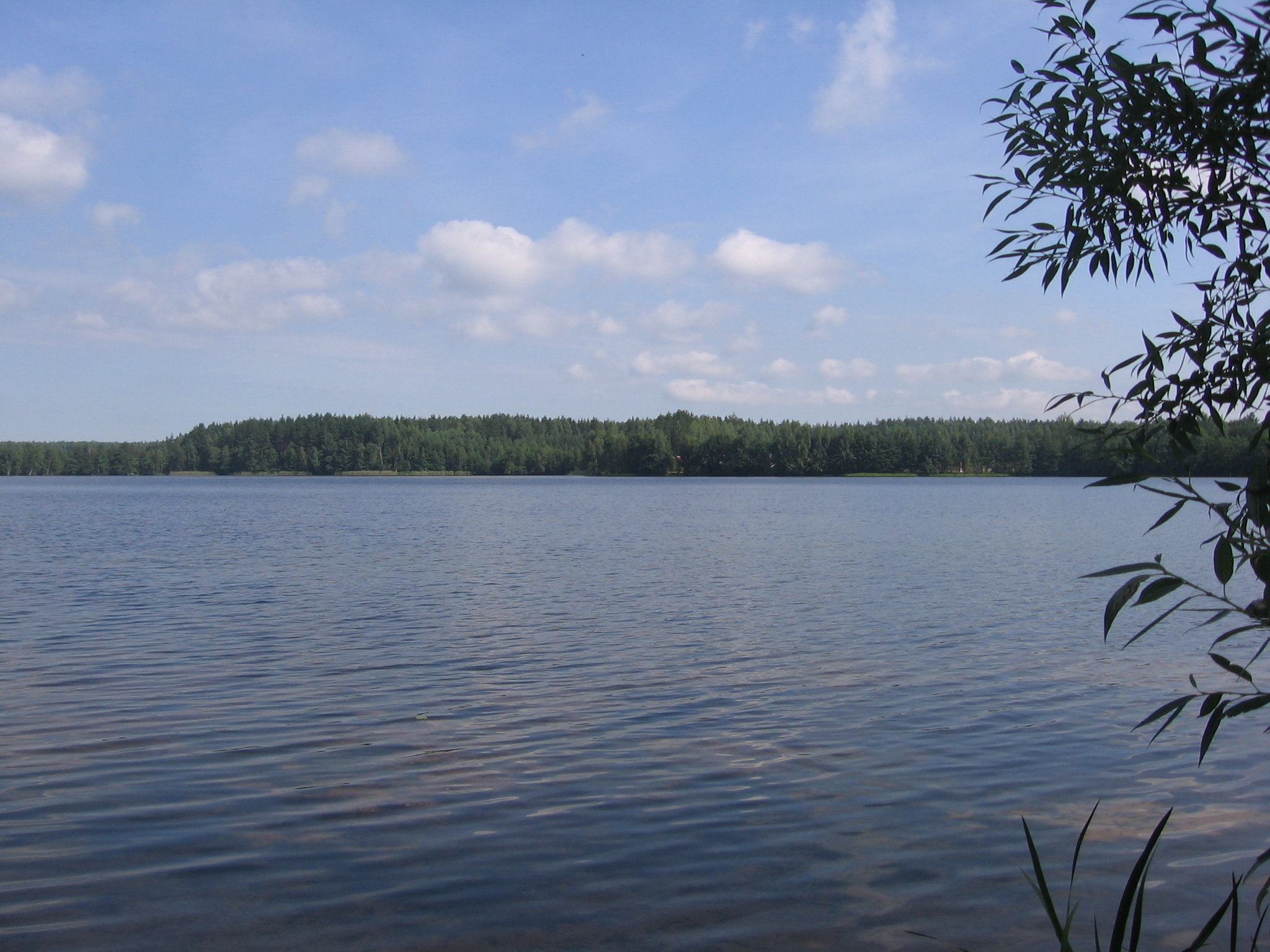 Кармановка